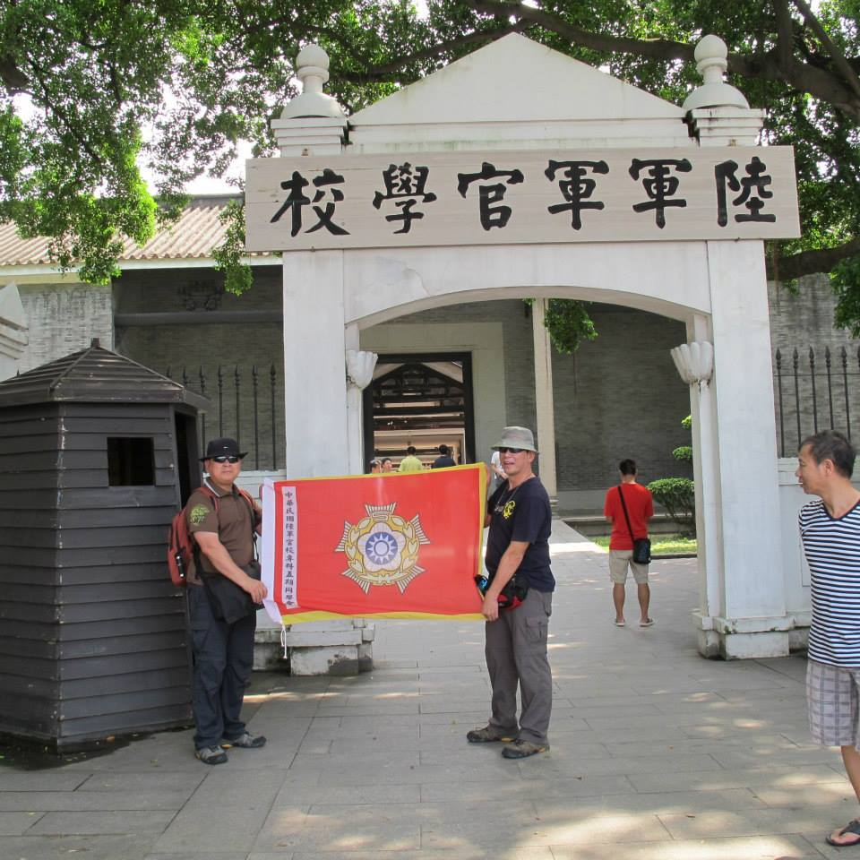 中華民國陸軍軍官學校專科五期同學會「廣州黃埔母校尋根之旅」，第二屆理事長劉書臺與常務監事湯康齡展示會旗於黃埔軍官學校校門。